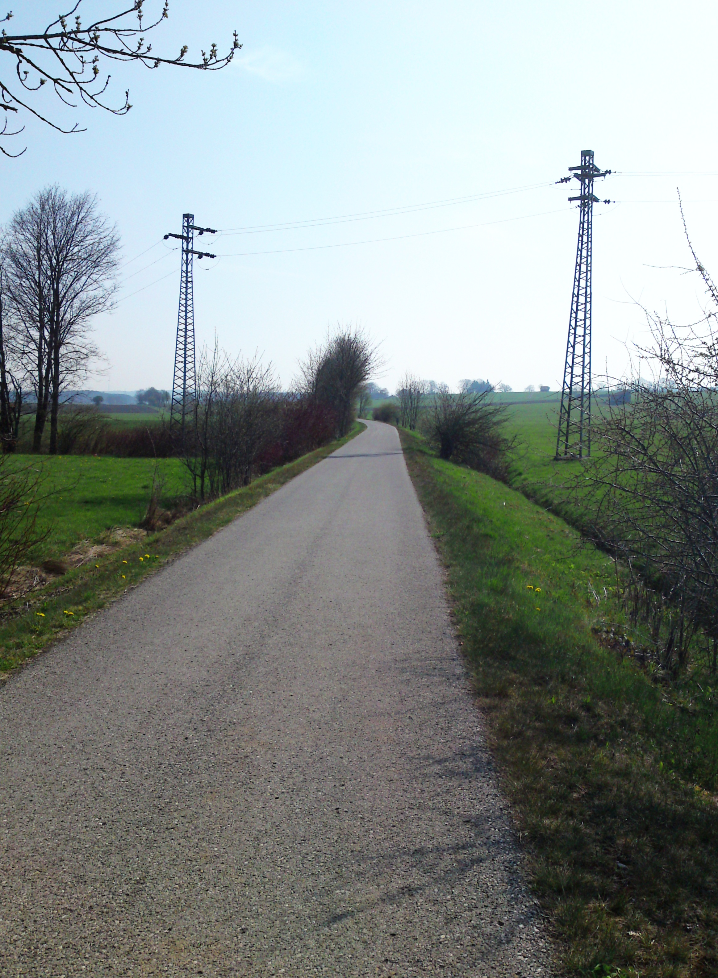 Fahrradweg auf dem Bahndamm des ehemaligen Schongauer Bähnle, zwischen Kaufbeuren und Aufkirch